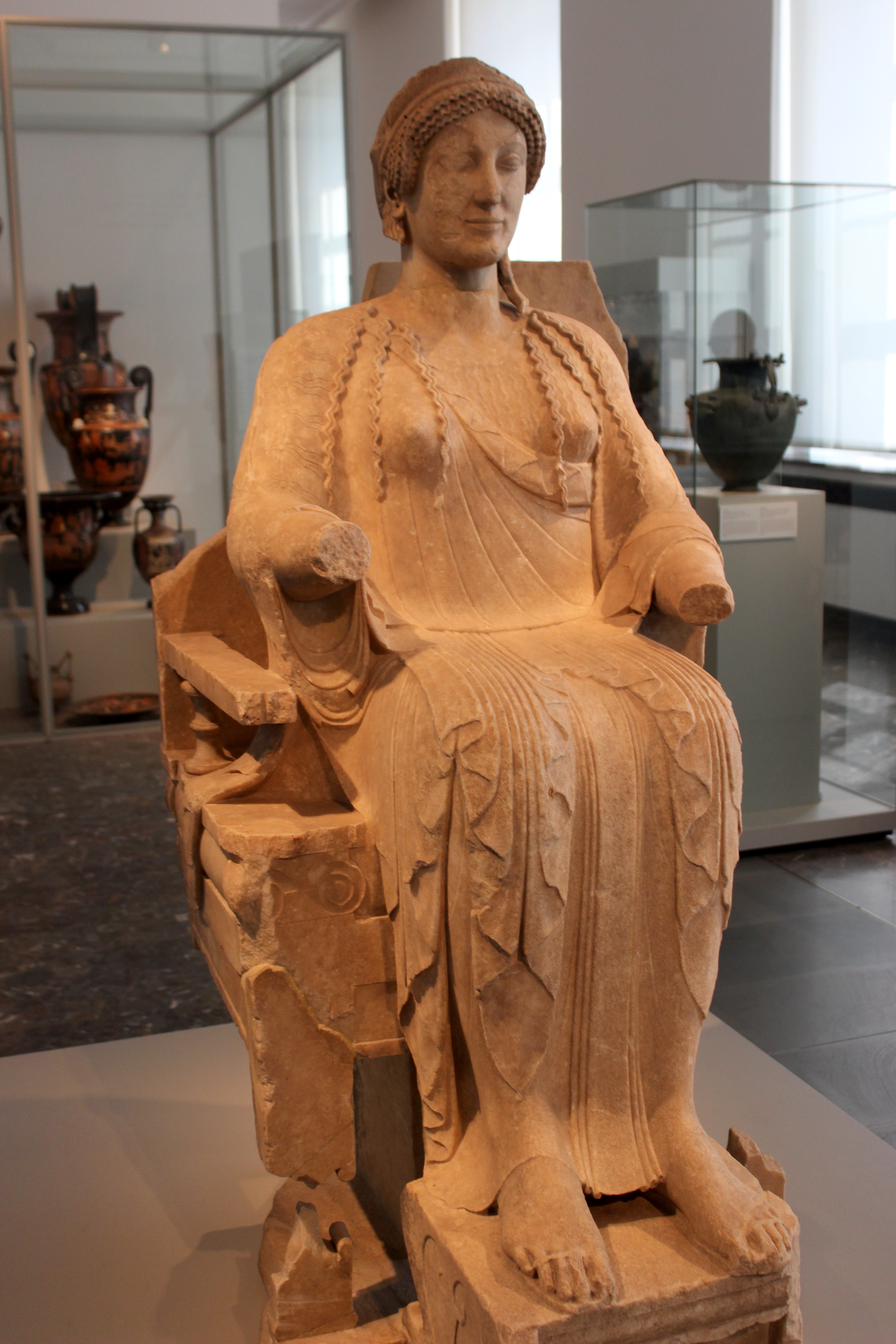 Altes Museum. Diosa de Tarento.